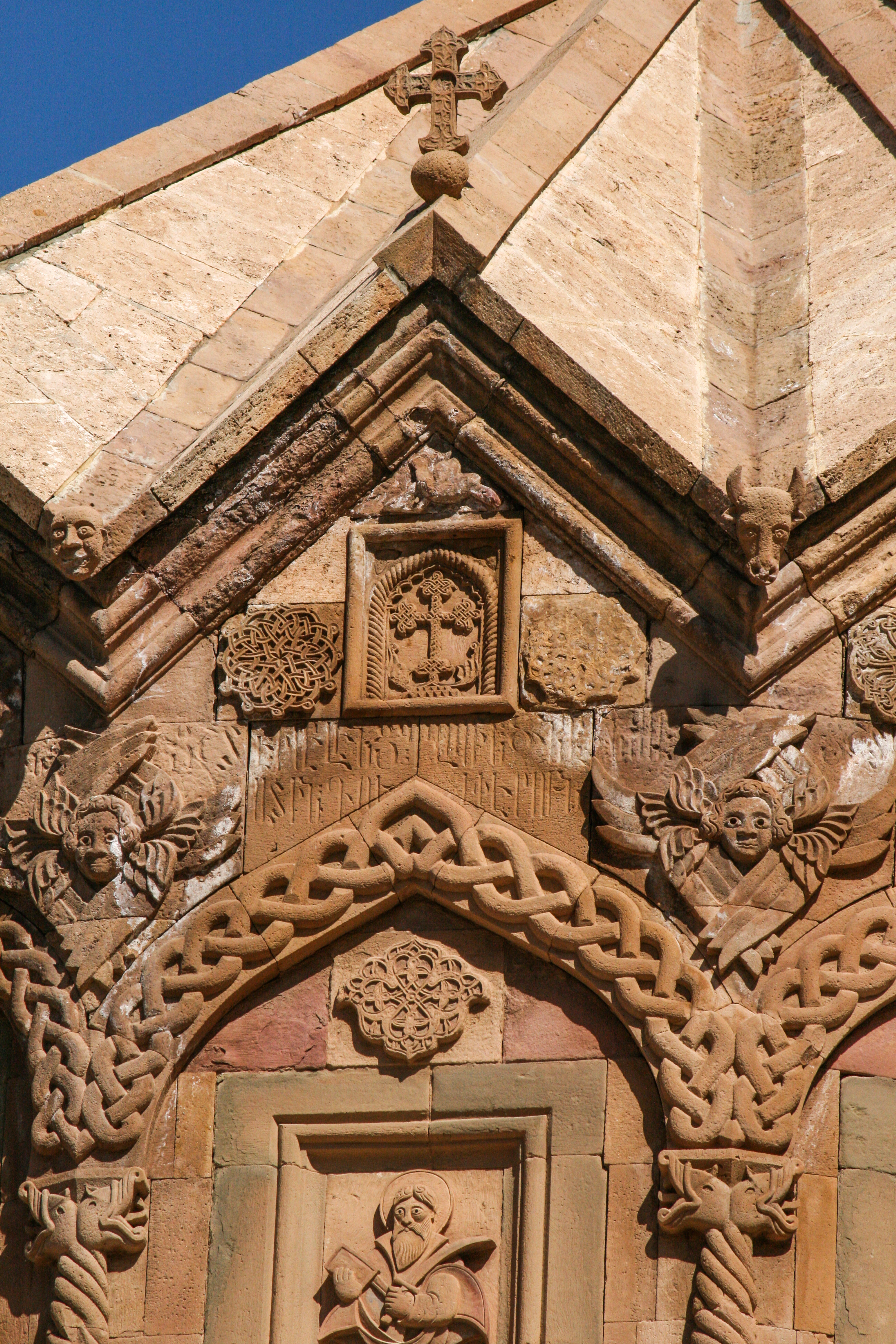 نشانه های سنگی در برج کلیسای استفانوس جلفا